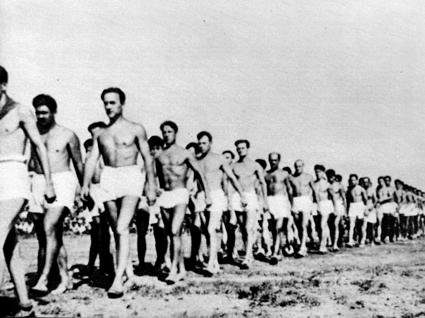 Logor Girs 1939. godine. Čas fiskulture. Medu ostalima: Slobodan Mitrov, Laza Latinović i Srećko Manola.